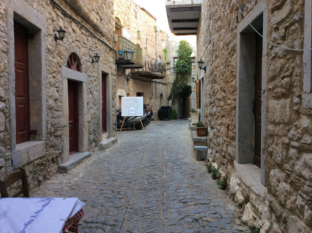 Χωριό της Χίου